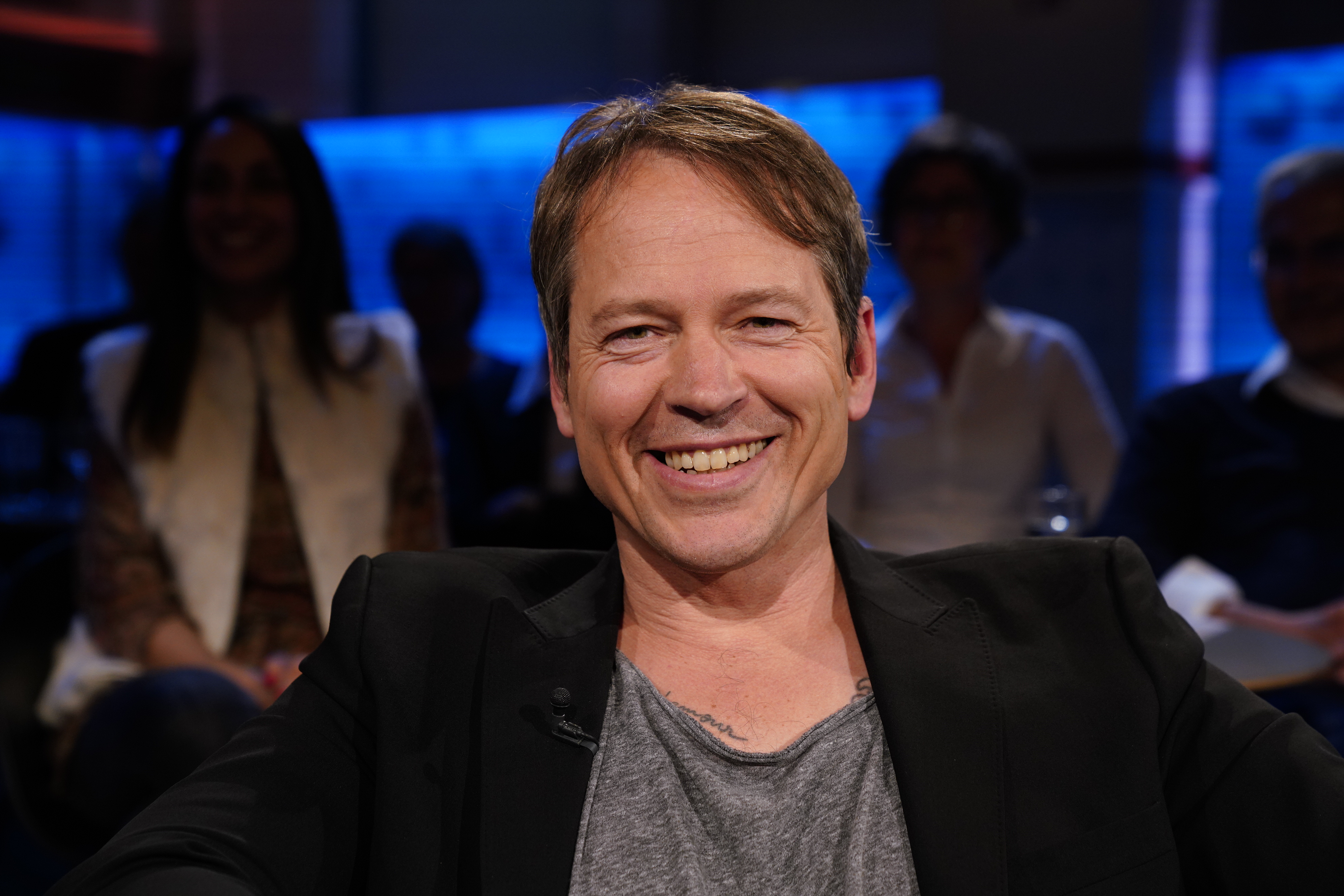 Michel Ruge tritt in der Talkshow Nachtcafé auf